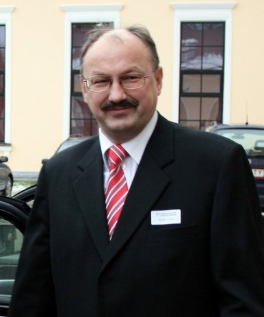 Tanel Linnus